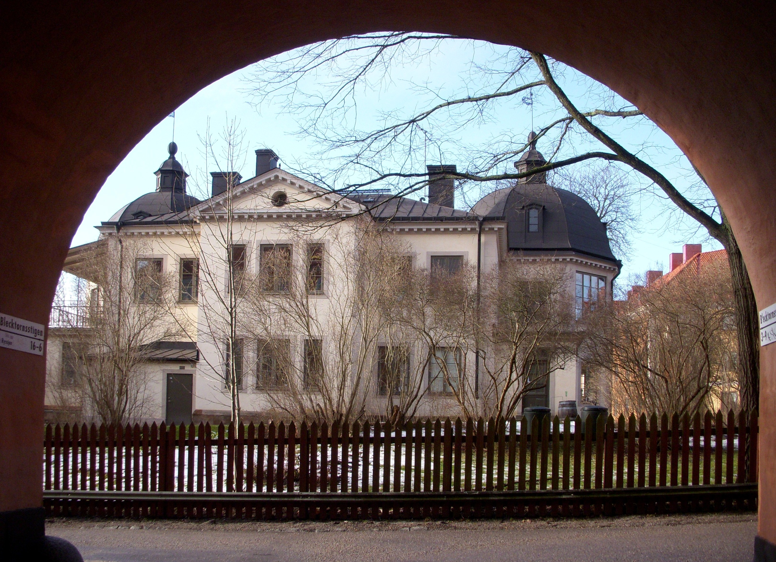 Blecktornsområdet på Södermalm i Stockholm